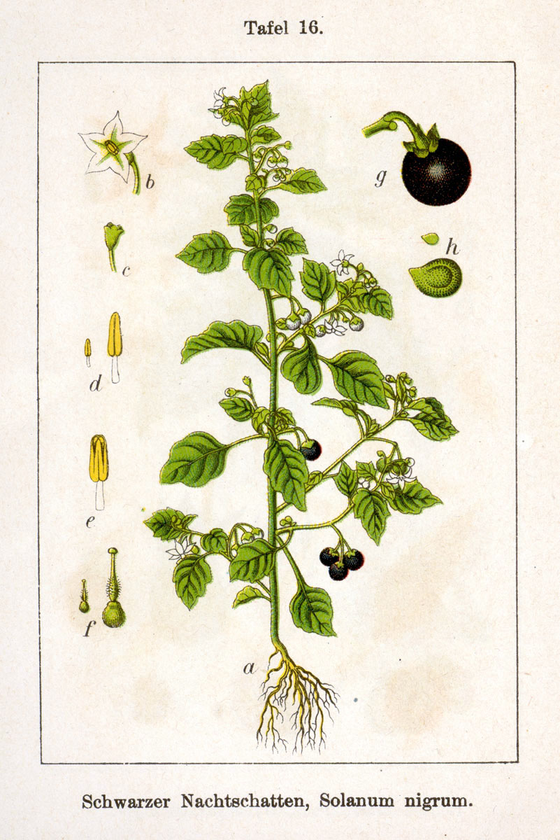 Solanum nigrum L. Original Description Schwarzer Nachtschatten, Solanum nigrum